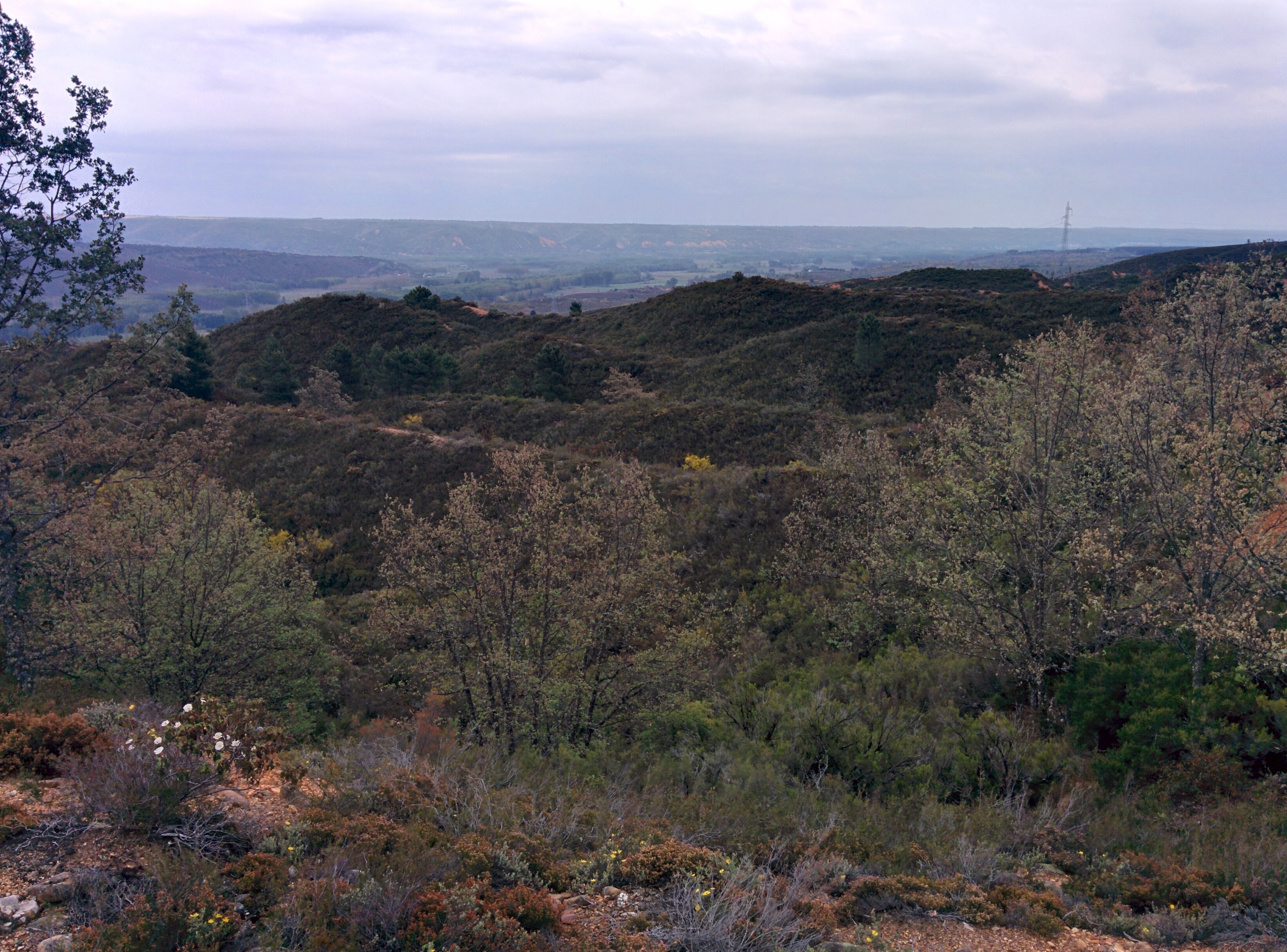 Mina de oro de Las Miédolas, en Las Omañas (León, España).